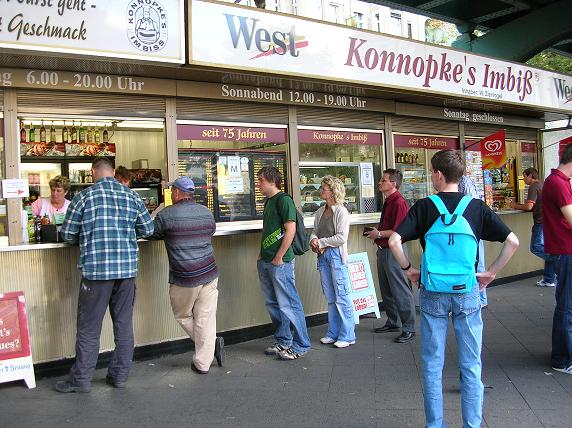 Konnopkes Imbiss, Schönhauser Allee, Berlin